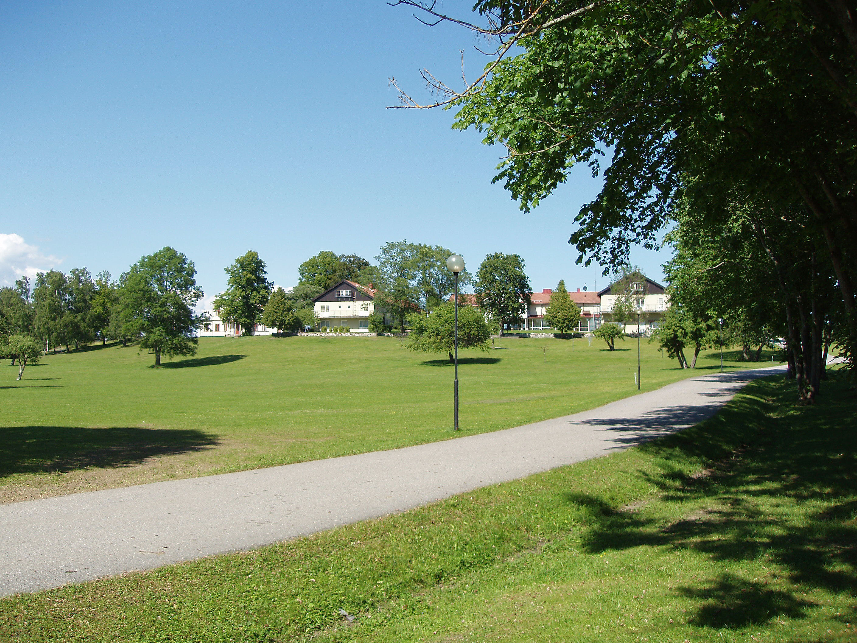 Södergarns konferensgård, Lidingö.